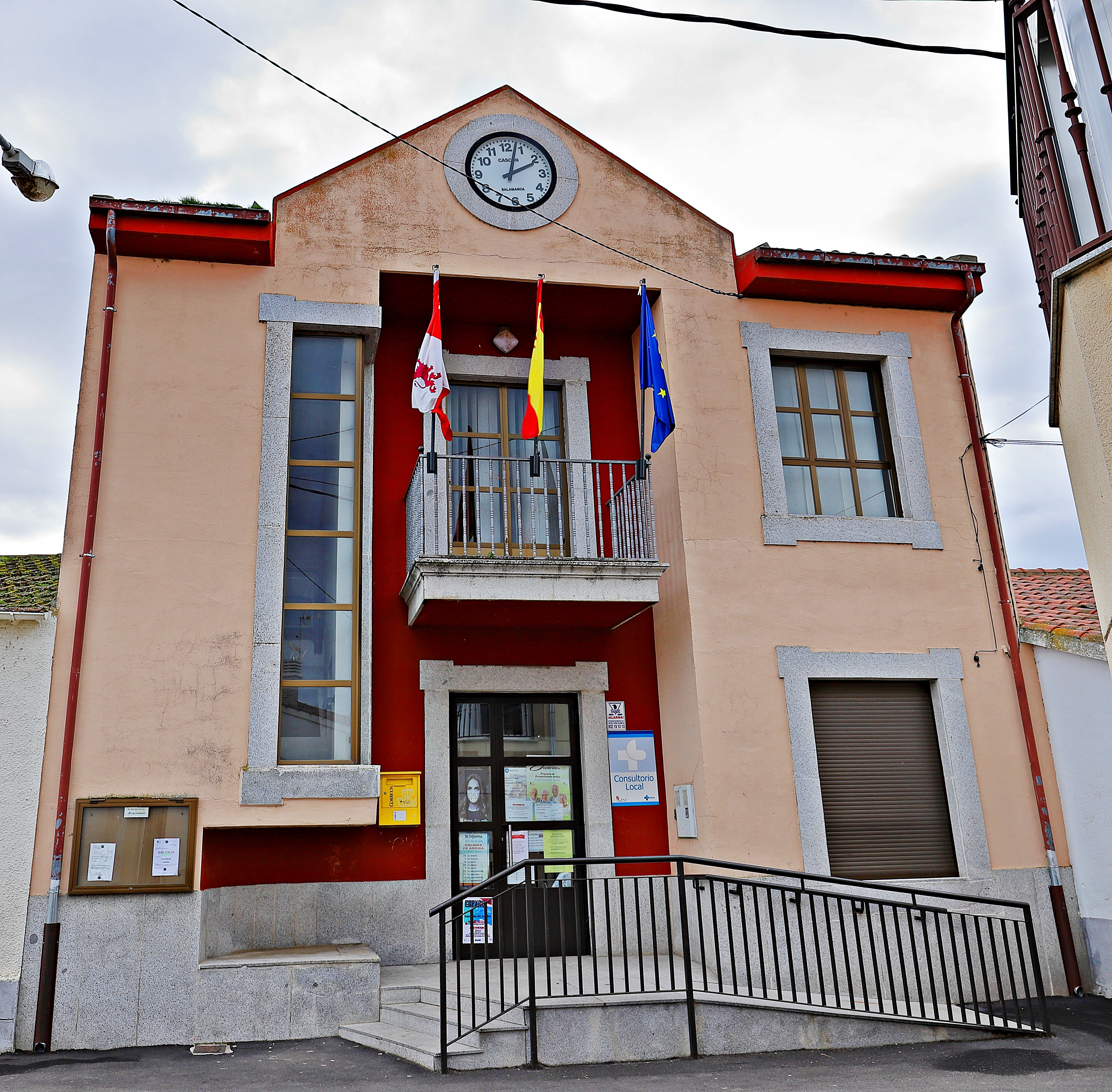 Encinas de Arriba municipio de la comarca Tierra de Alba, en la provincia de Salamanca.